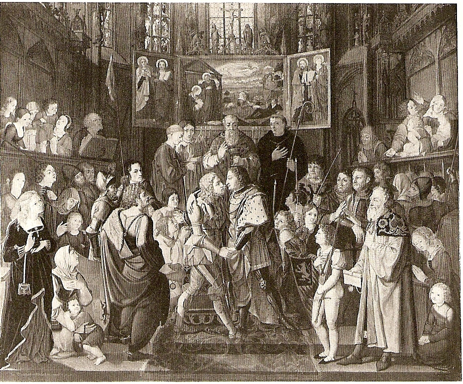 Scan einer Reproduktion Nazarenisches Historiengemälde Versöhnung Ludwigs des Bayern mit Friedrich dem Schönen. Original im Museum Behnhaus in Lübeck.